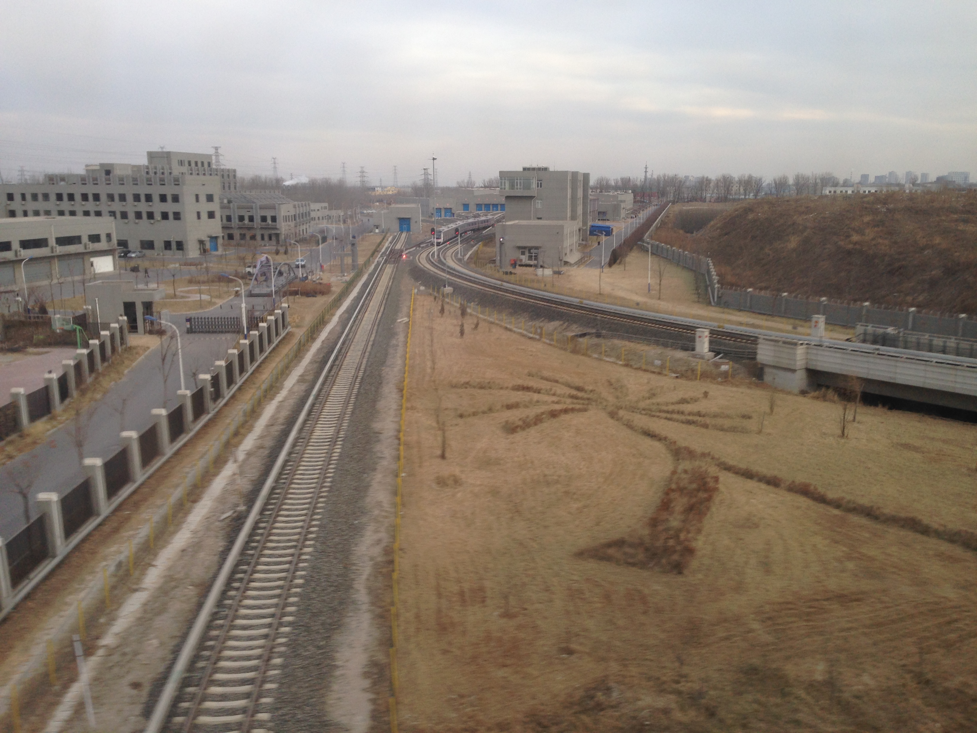 中文（中国大陆）: 北京地铁昌平线定泗路停车场